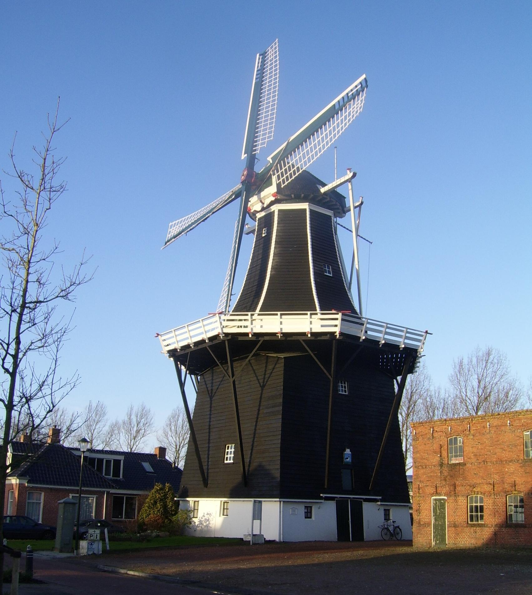 korenmolen De Kievit in Grijpskerk (Groningen, Nederland)